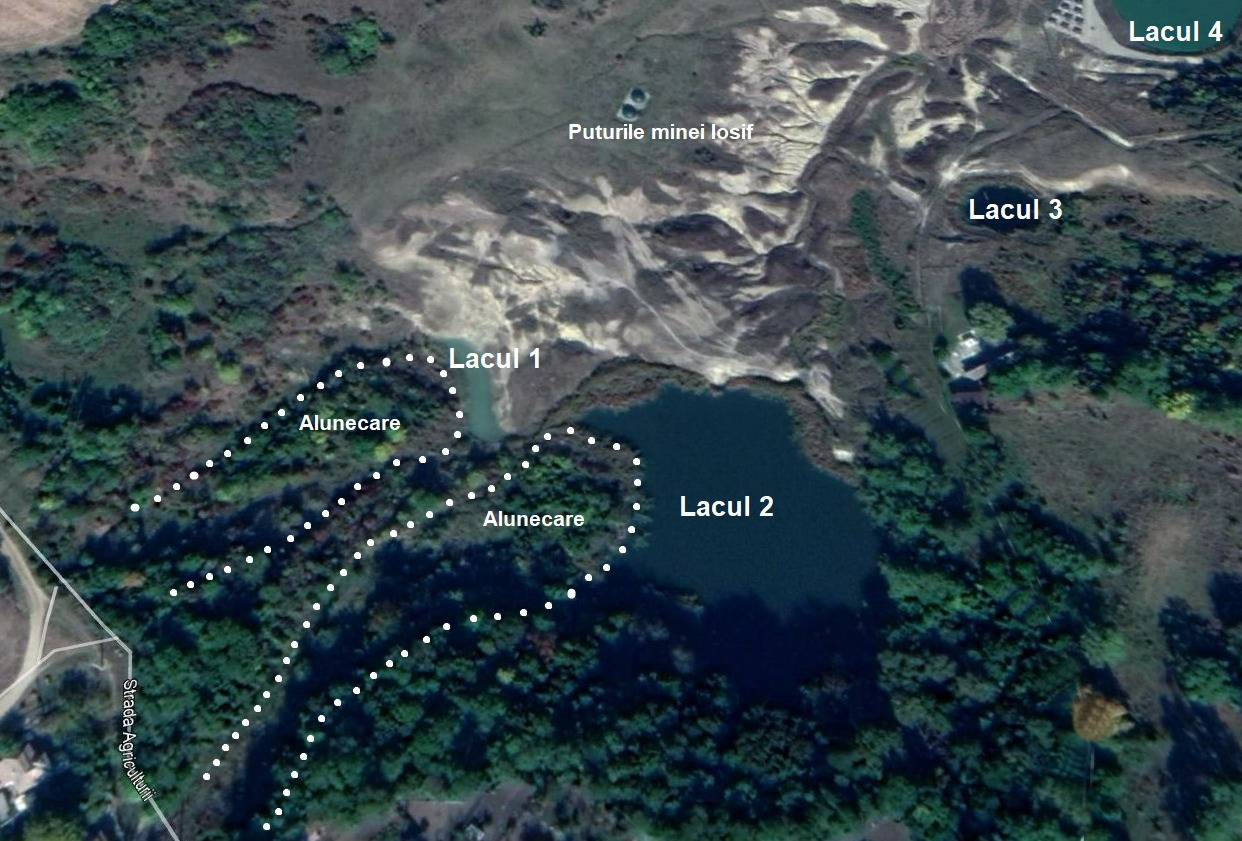 Turda, Durgău, două alunecări de teren spre lacurile 1 şi 2